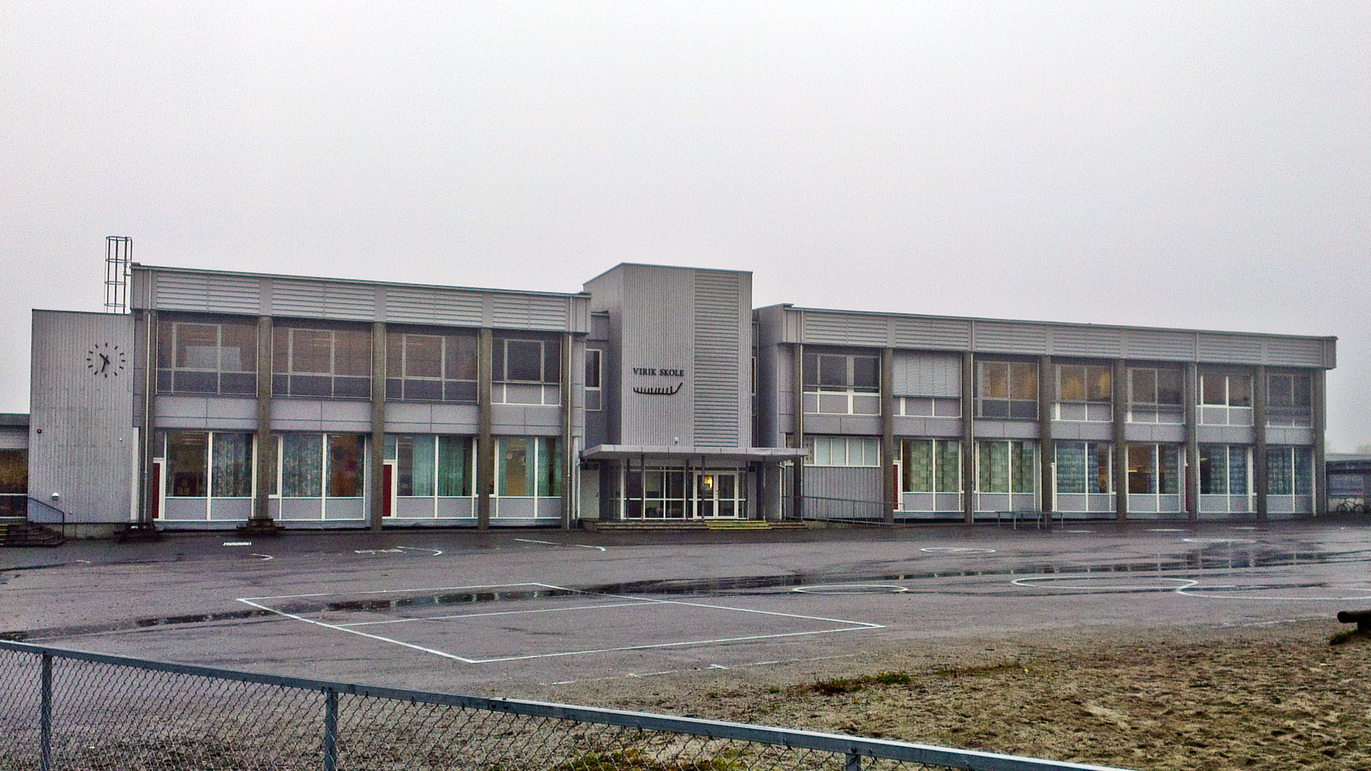 Virik skole i Sandefjord